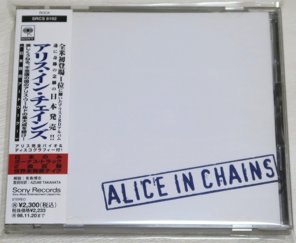 белая обложка японского издания альбома Alice in Chains